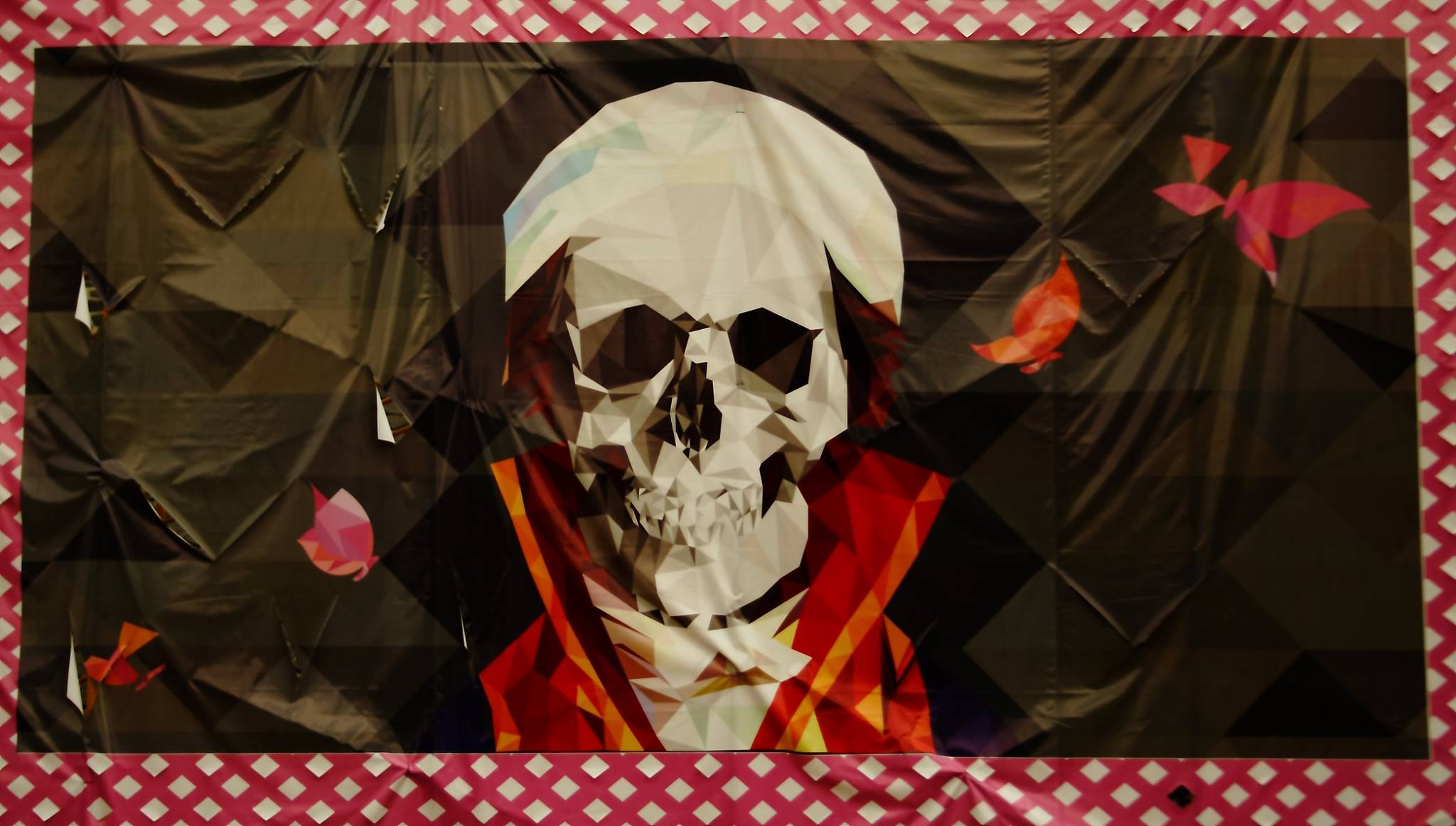 Pancarta sobre "Morelos", durante la celebración del día de muertos en Ciudad Universitaria, México.